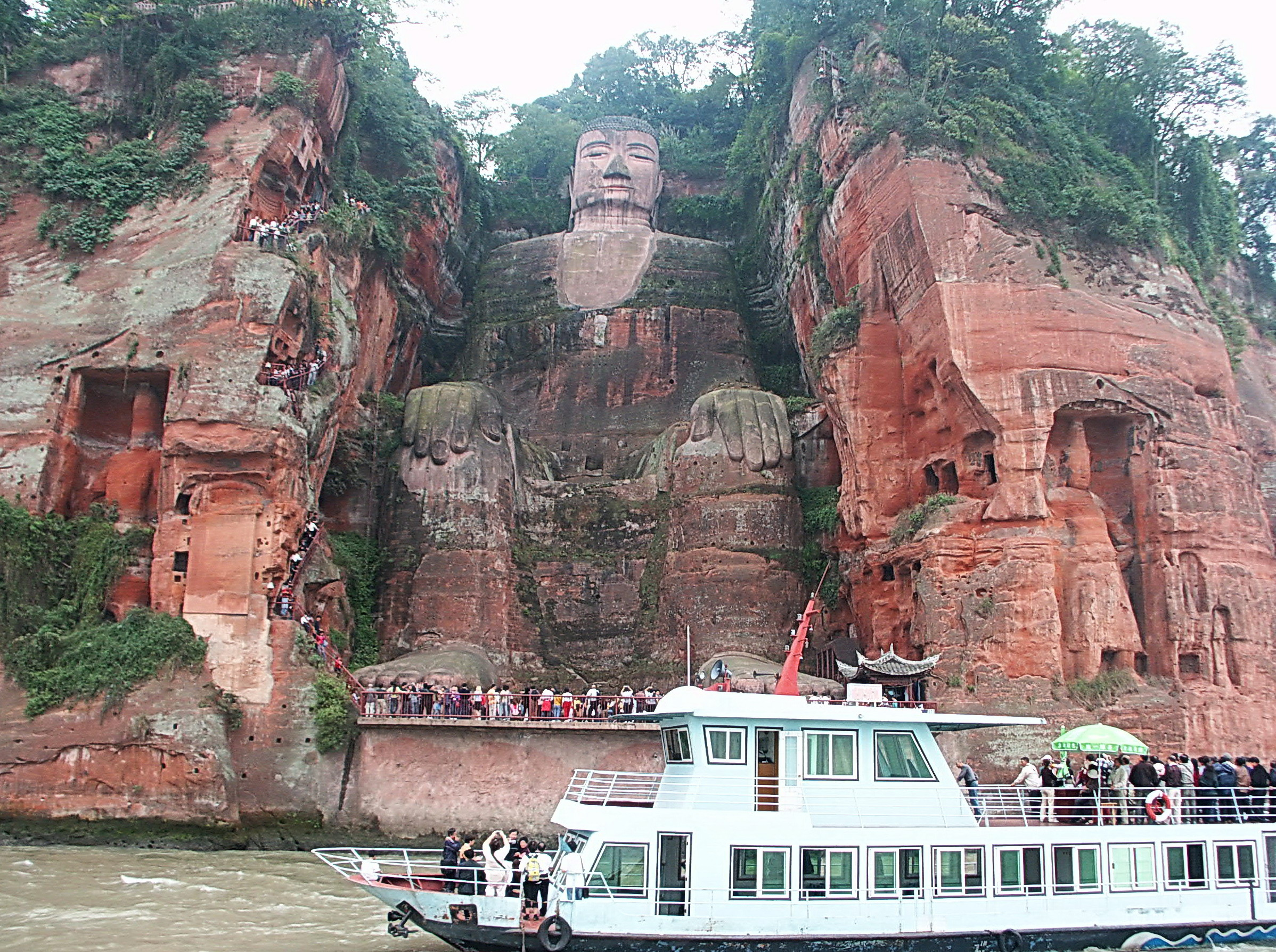 樂山大佛 Leshan Giant Buddha